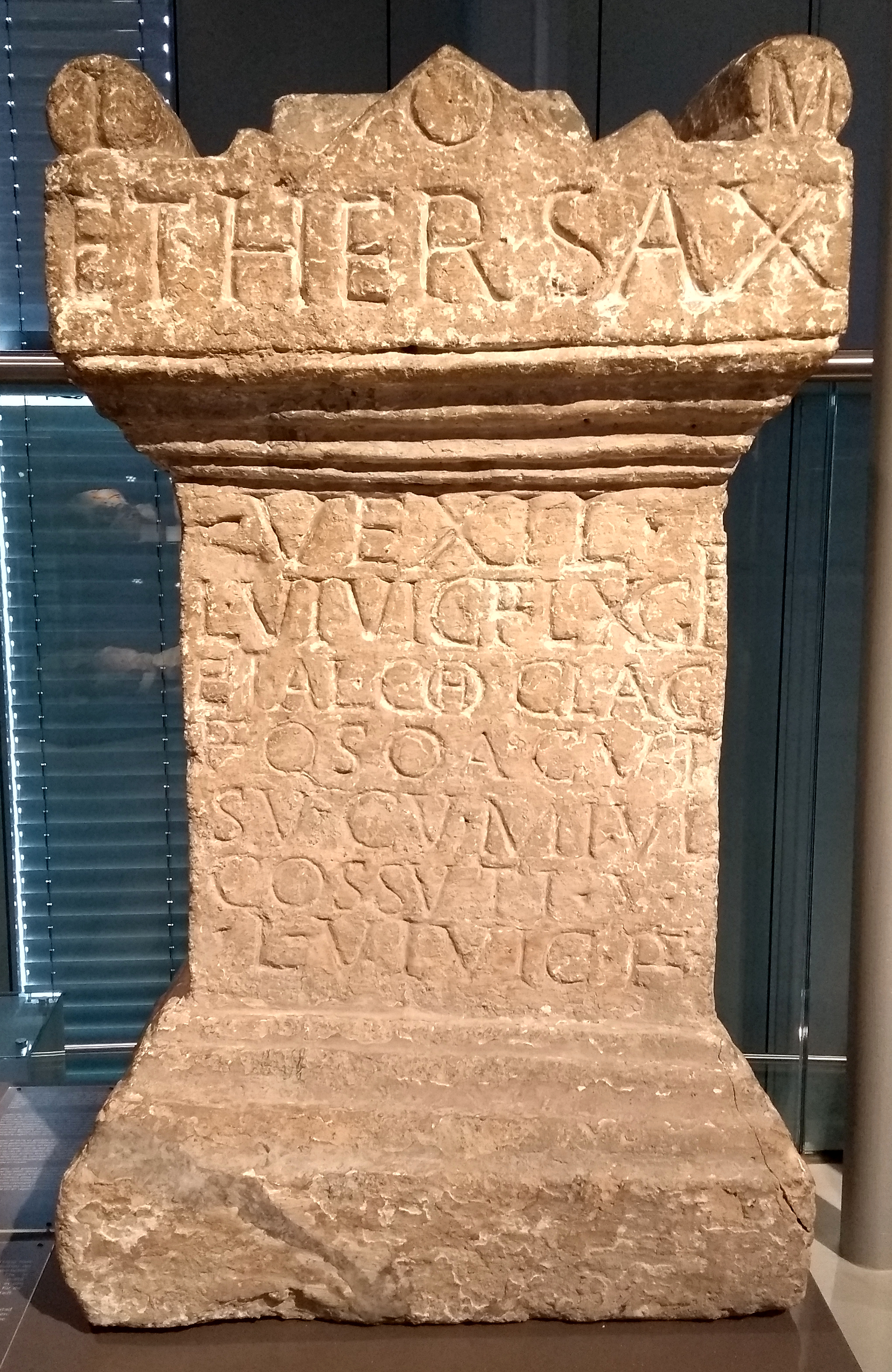 Weihestein für Iupiter Optimus Maximus und Hercules Saxanus (CIL XIII 7716) im LVR-RömerMuseum